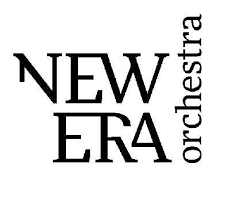 Логотип New Ora Orchestra